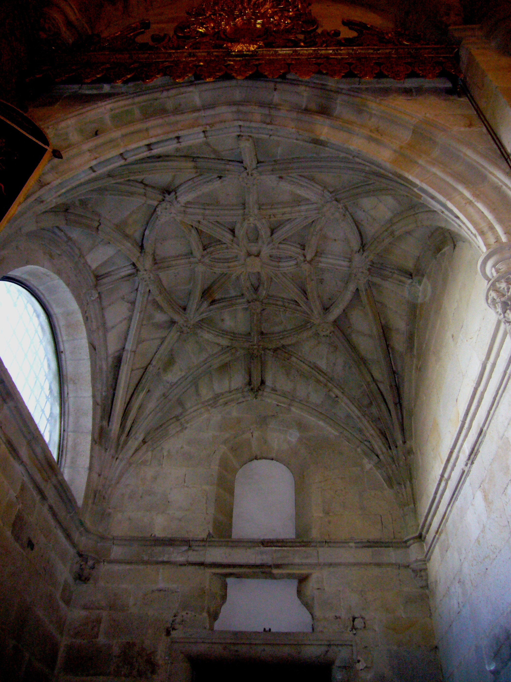 Abóbada manuelina, da capela do lado da Epístola